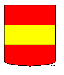 Wapen van de gemeente Maasdam.